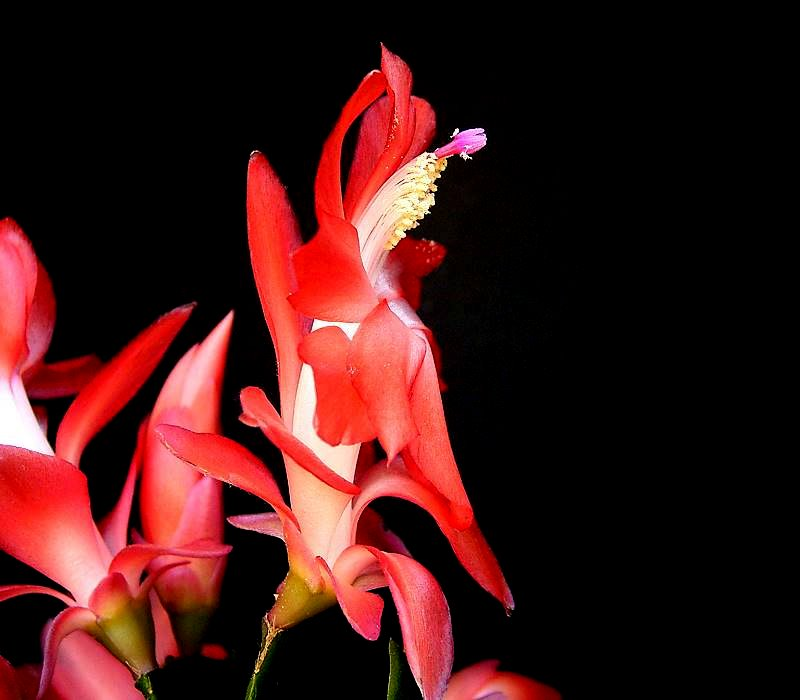 Schlumbergera